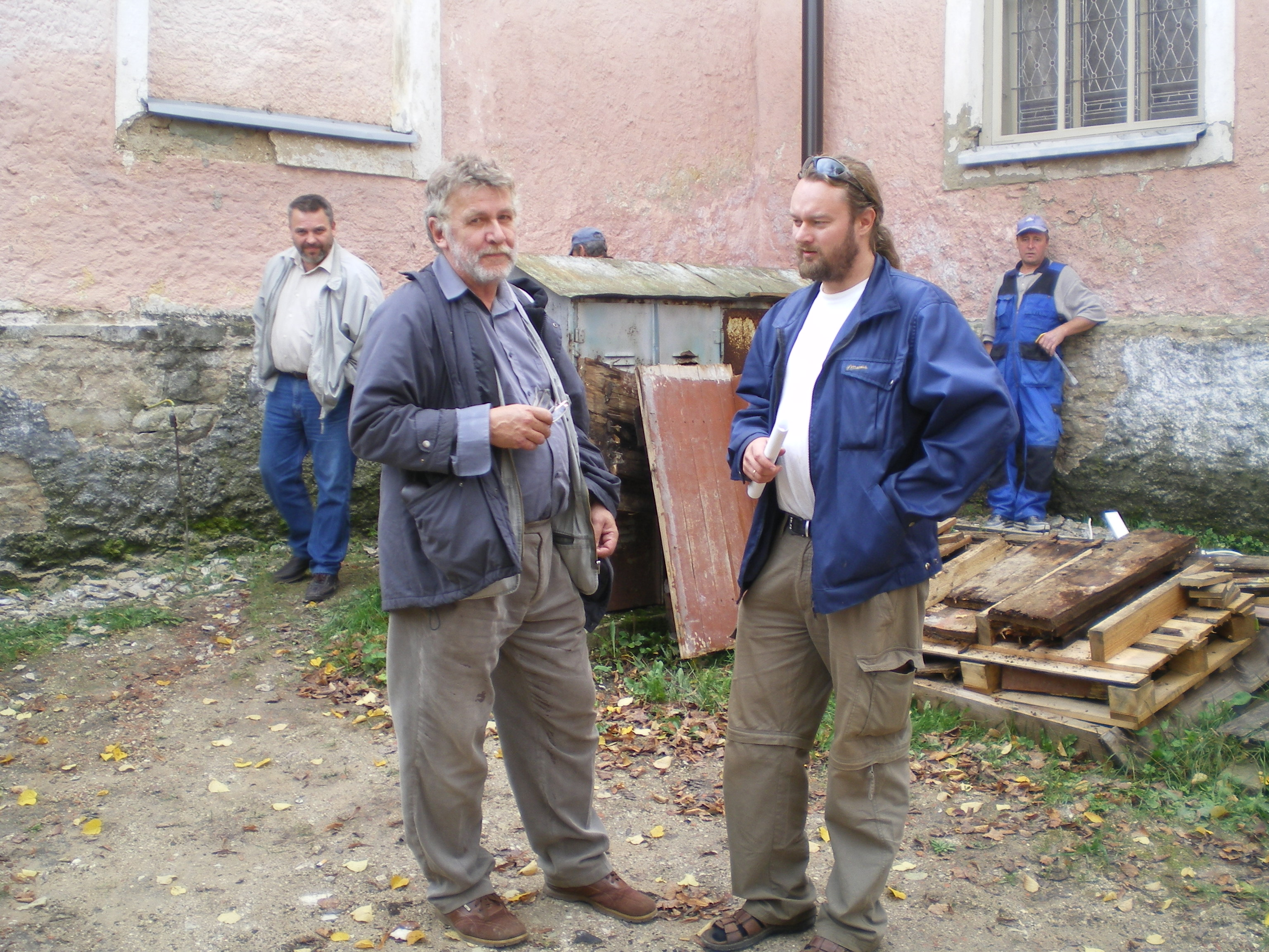 Arhitektuuriajaloolane Kaur Alttoa (vasakul) ja arheoloog Villu Kadakas (paremal) Paide kiriku hoovis 1.10.2007